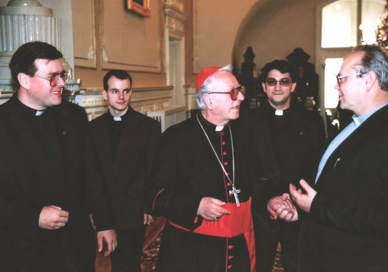 Kardinál Ján Chryzostom Korec, SJ, nitriansky diecézny biskup v rozhovore so spolubratmi jezuitmi.